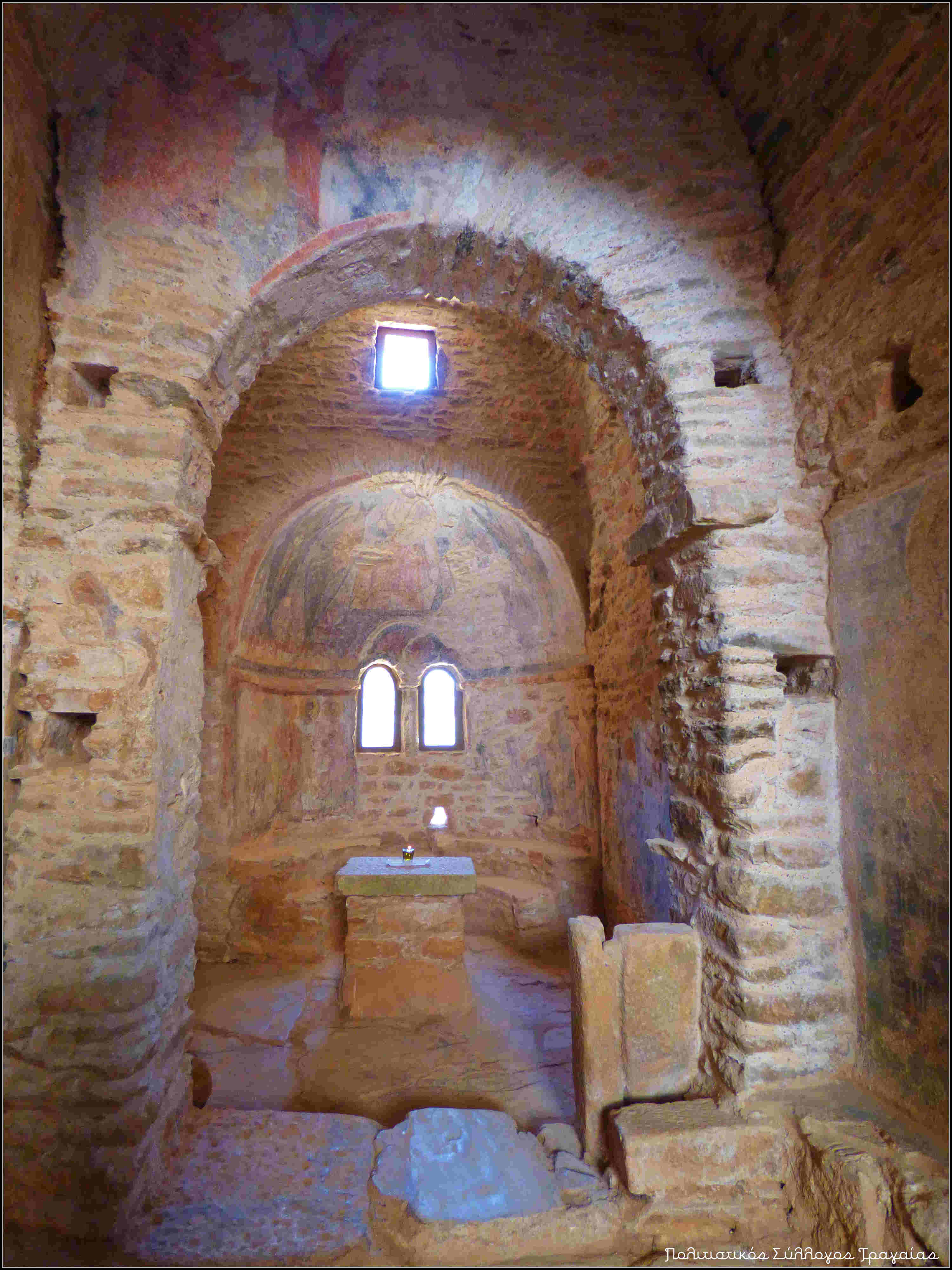 Η αψίδα του Ιερού